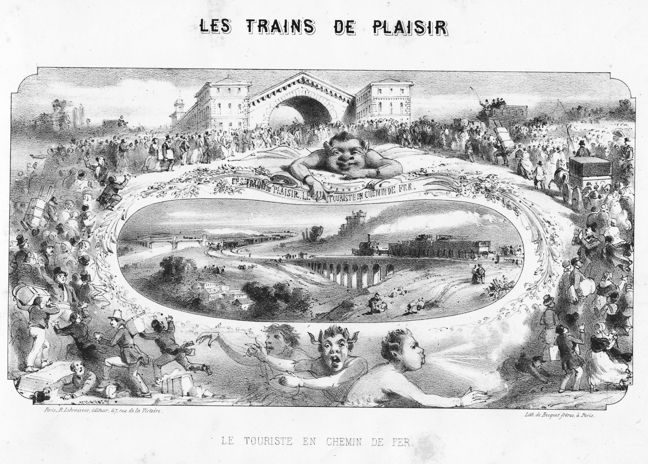 Train de plaisir